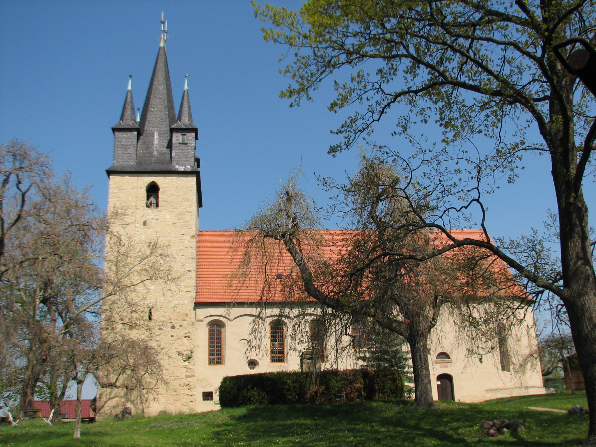 Seitenansicht (Foto vom April 2019)